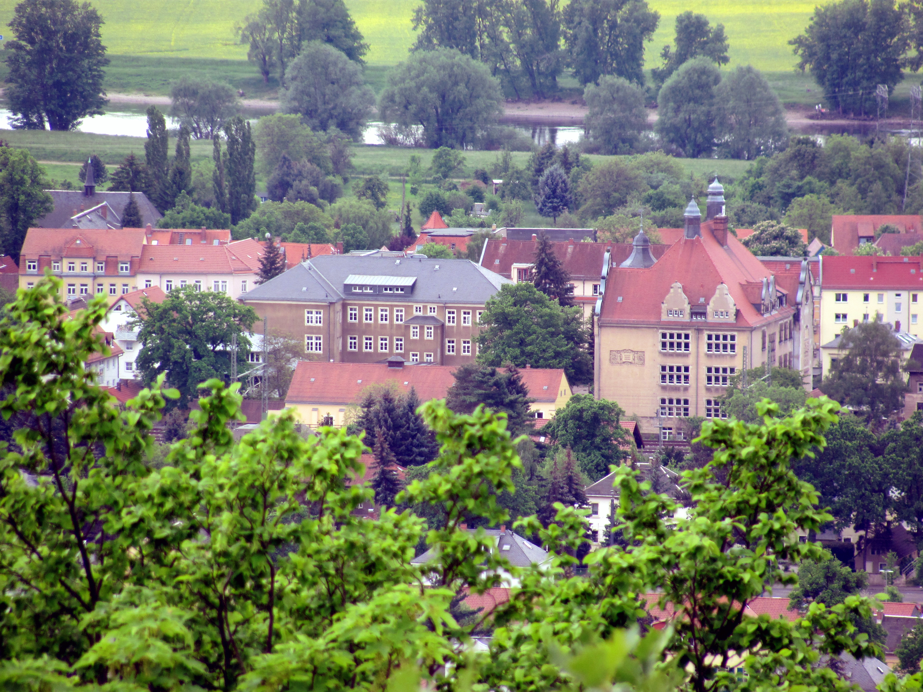 Radebeul, Grundschule Kötzschenbroda und Oberschule Kötzschenbroda von Friedrich-August-Höhe aus.